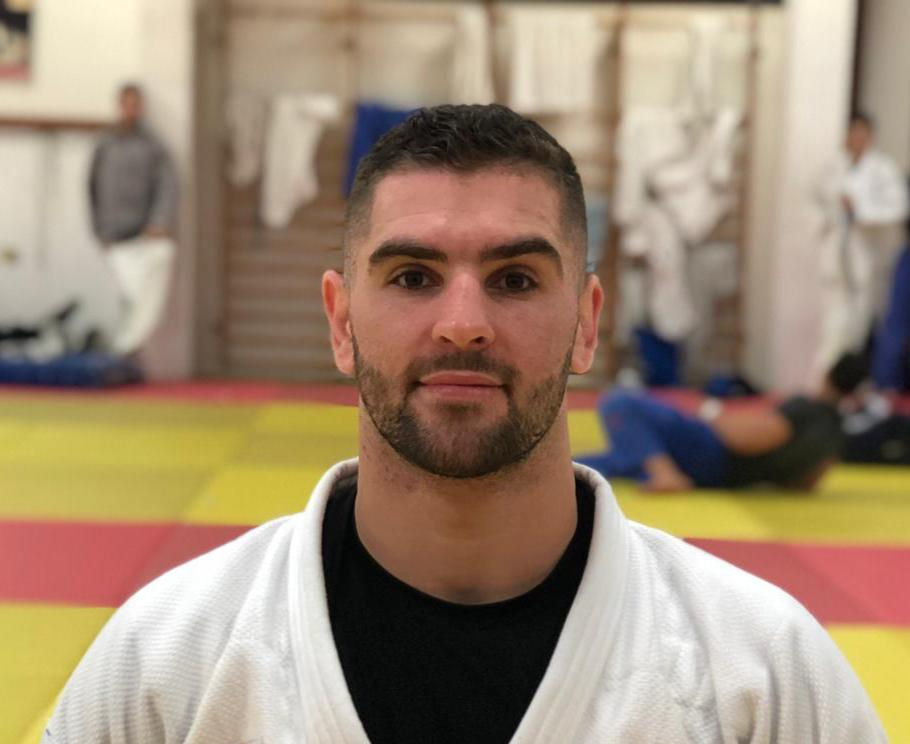 תמונת פרופיל של פיטר פלצ'יק. ג'ודקא ישראלי בכיר.